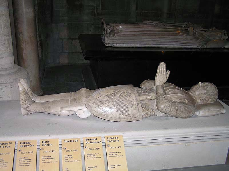 Saint-Denis (Île-de-France), basilique nécropole royale, gisant du connétable Bertrand du Guesclin (1320 - 1380), héros de la guerre de Cent Ans.